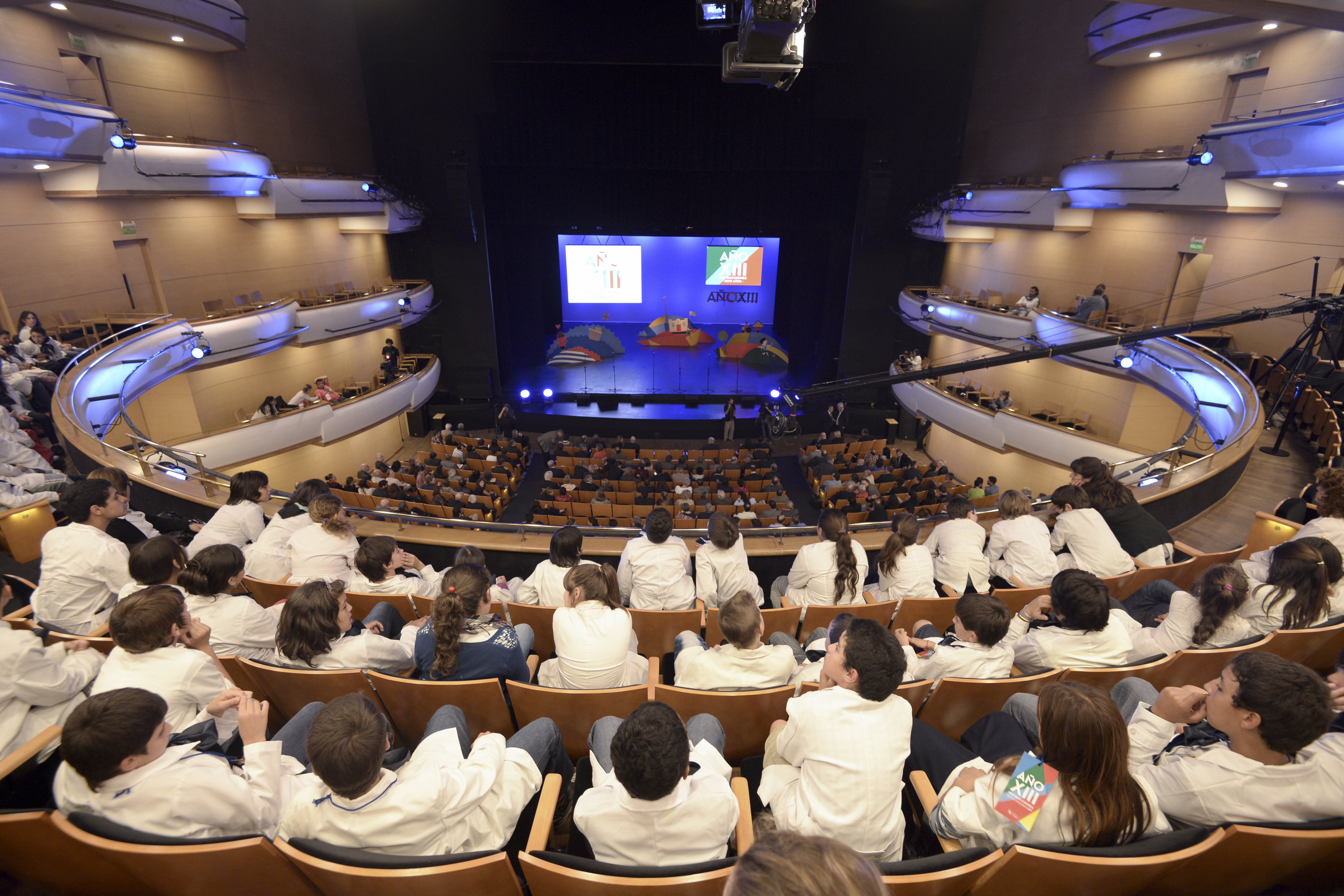 El 3 de abril del año 2011 se realizó en Uruguay, la Ceremonia de Apertura de los Festejos del Año XIII. Dicho evento estuvo enmarcado en las actividades conmemorativas del Bicentenario de Uruguay, las cuales tuvieron lugar durante ese año. En a ceremonia, que tuvo lugar en Montevideo, participaron mas de 500 niños de 19 escuelas de todo el país. La fotografía fue tomada por Pablo Rivara para la Secretaría del Bicentenario, dependiente de la Comisión del Bicentenario, la cual está conformada por autoridades de todos los partidos políticos, de diferentes Ministerios y organismos públicos de Uruguay. Mail: Web